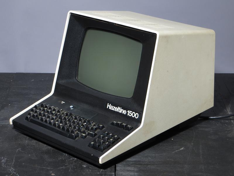 The Hazeltine 1500 terminal was introduced in April, 1977